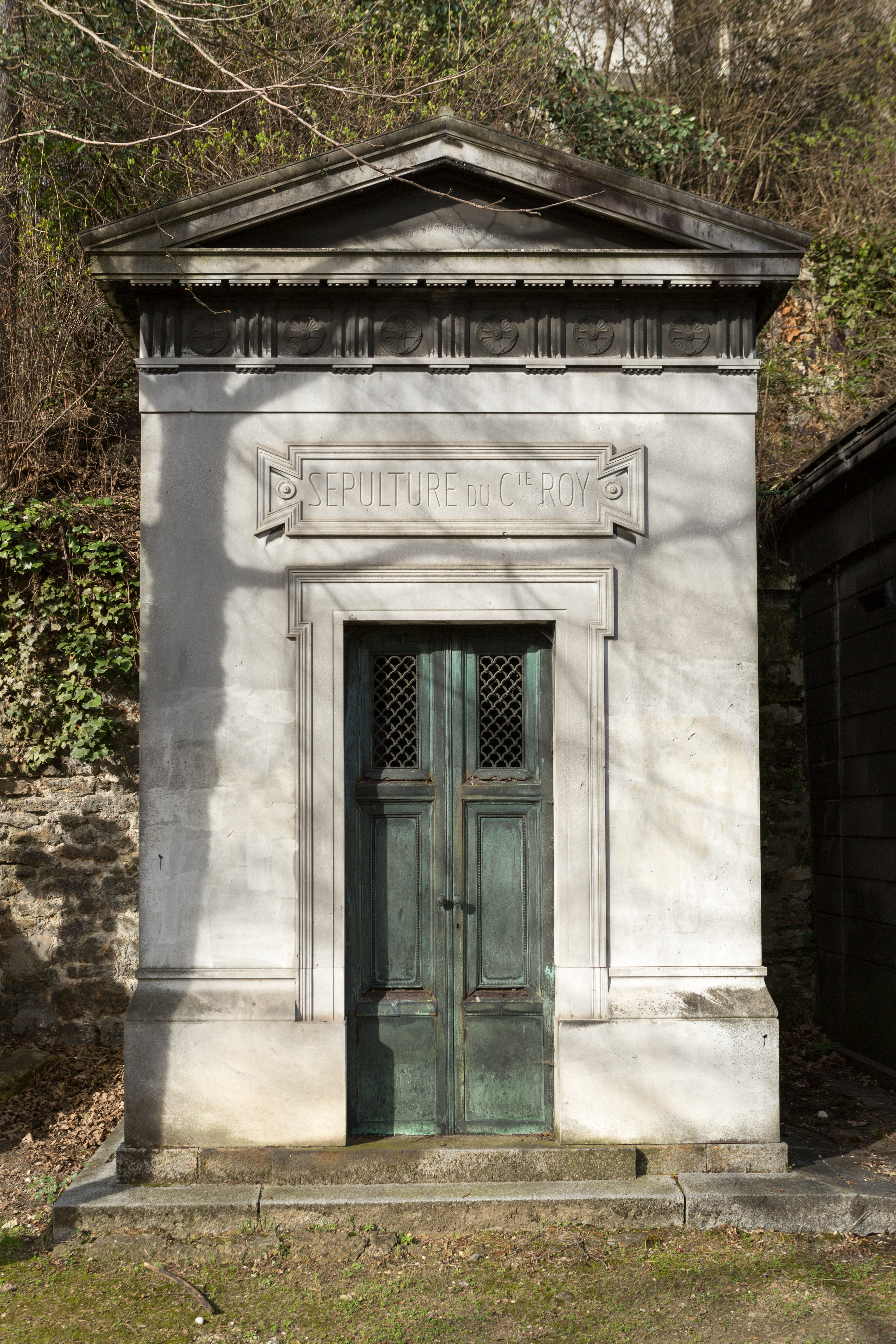 Chapelle du comte Antoine Roy (1764-1847).